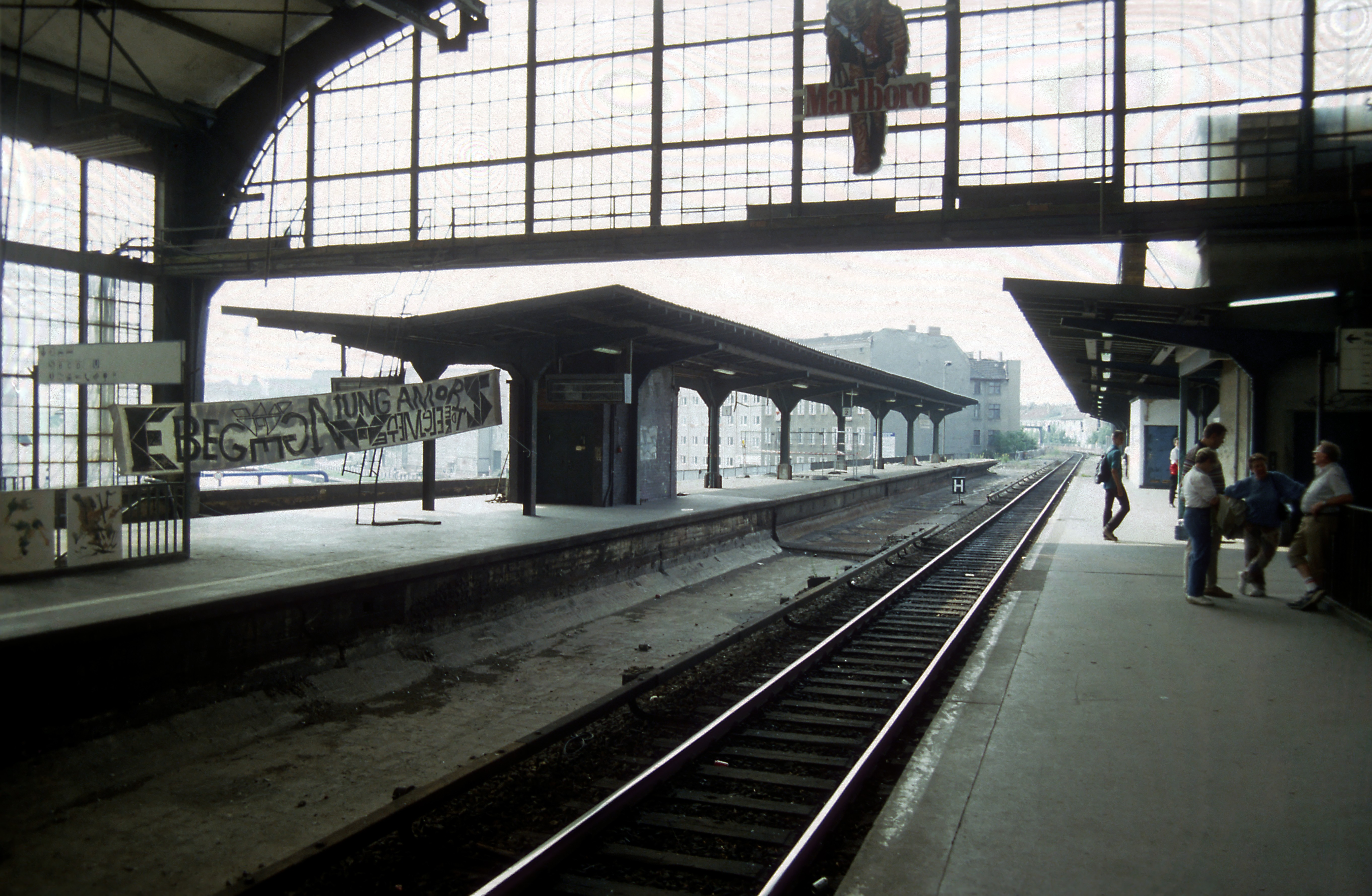 Fernbahnsteig A mit ausgebauten Gleisen. Noch verkehren die S-Bahn-Züge Richtung Osten vom Bahnsteig B, der während der Trennung zum Westnetz gehörte. Westliche Hallenschürze und Bahnsteigdachverlängerungen Richtung Spreebrücke.